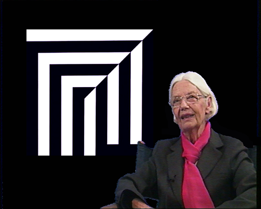 Portrait de l'artiste Ode Bertrand.